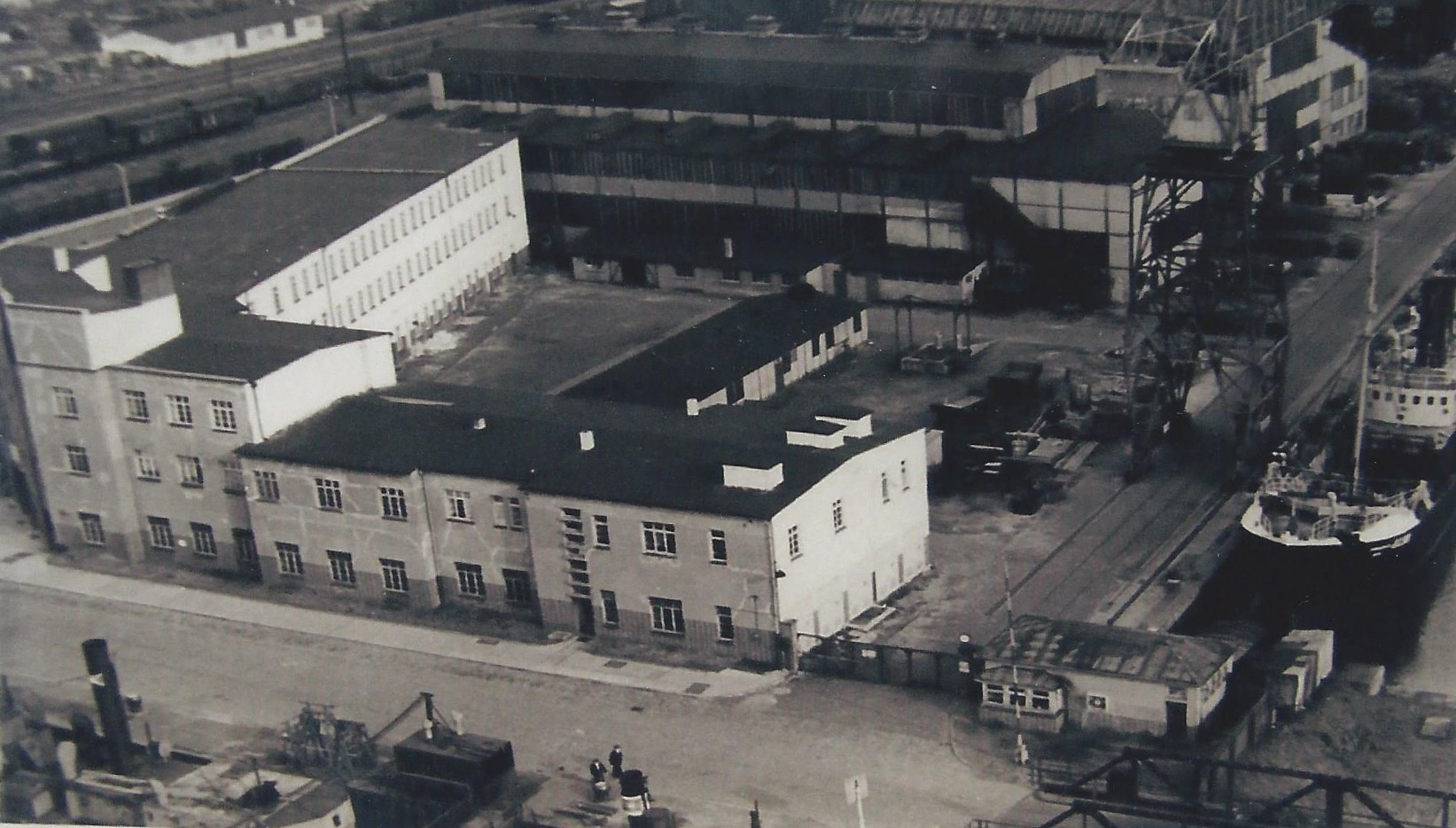 Verwaltungsgebäude der Seebeck-Werft in Geestemünde